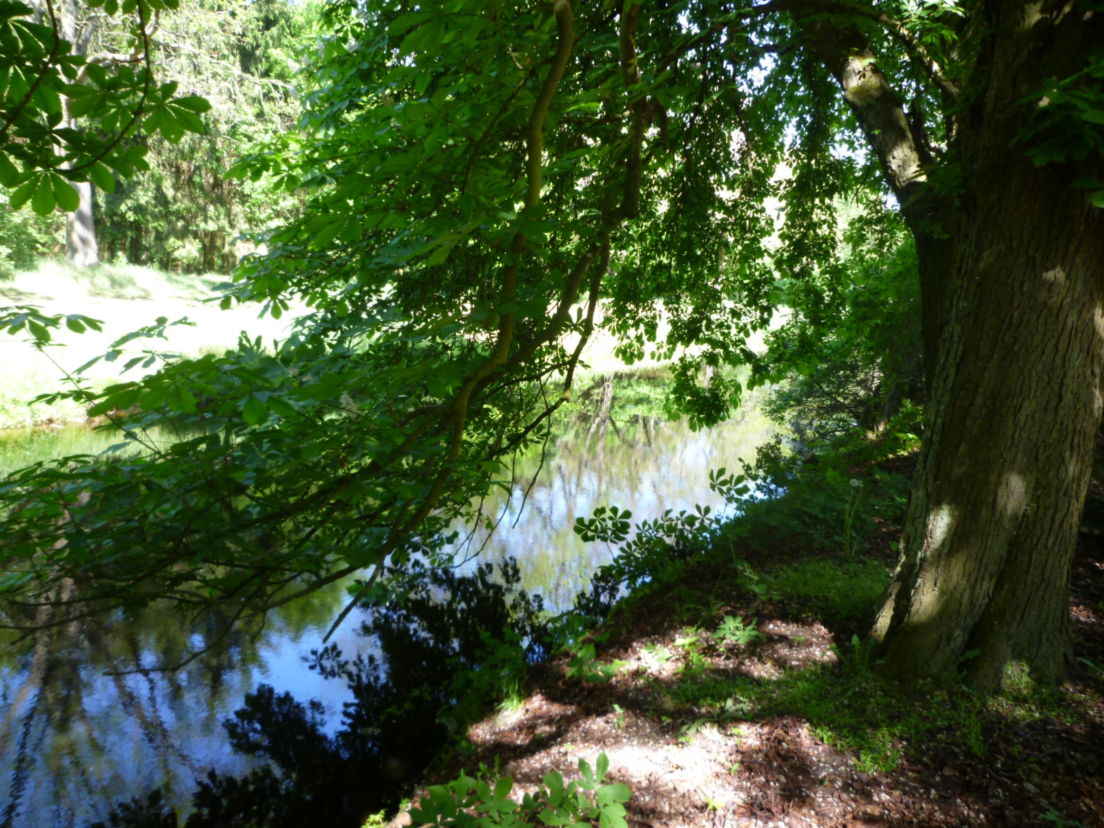 Die Ohre im Kämkerhorst in der Nähe des Drömlingsinformationsareals Kämkerhorst bei Calvörde, 2011